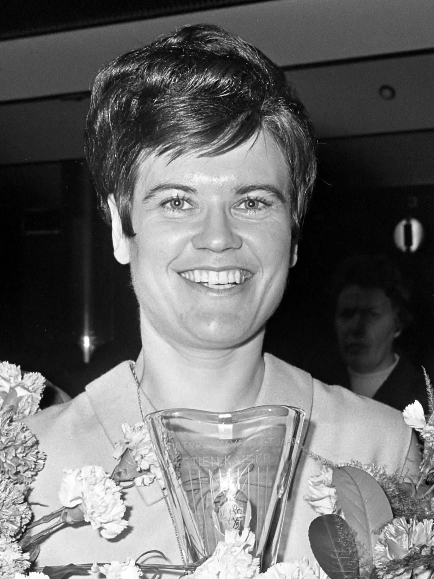 Sportman en Sportvrouw van het jaar 67 Vlnr. Ada Kok (2), Stien Kaiser (1) ,Coen Moulijn (2) 9 januari 1968